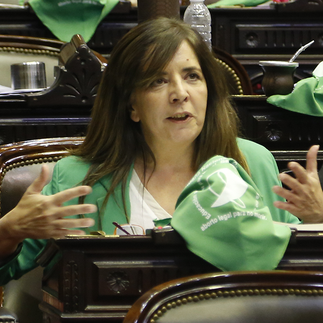 Sesión de la Cámara de Diputados Argentina por la despenalización del aborto. Diputada Cerruti Gabriela.